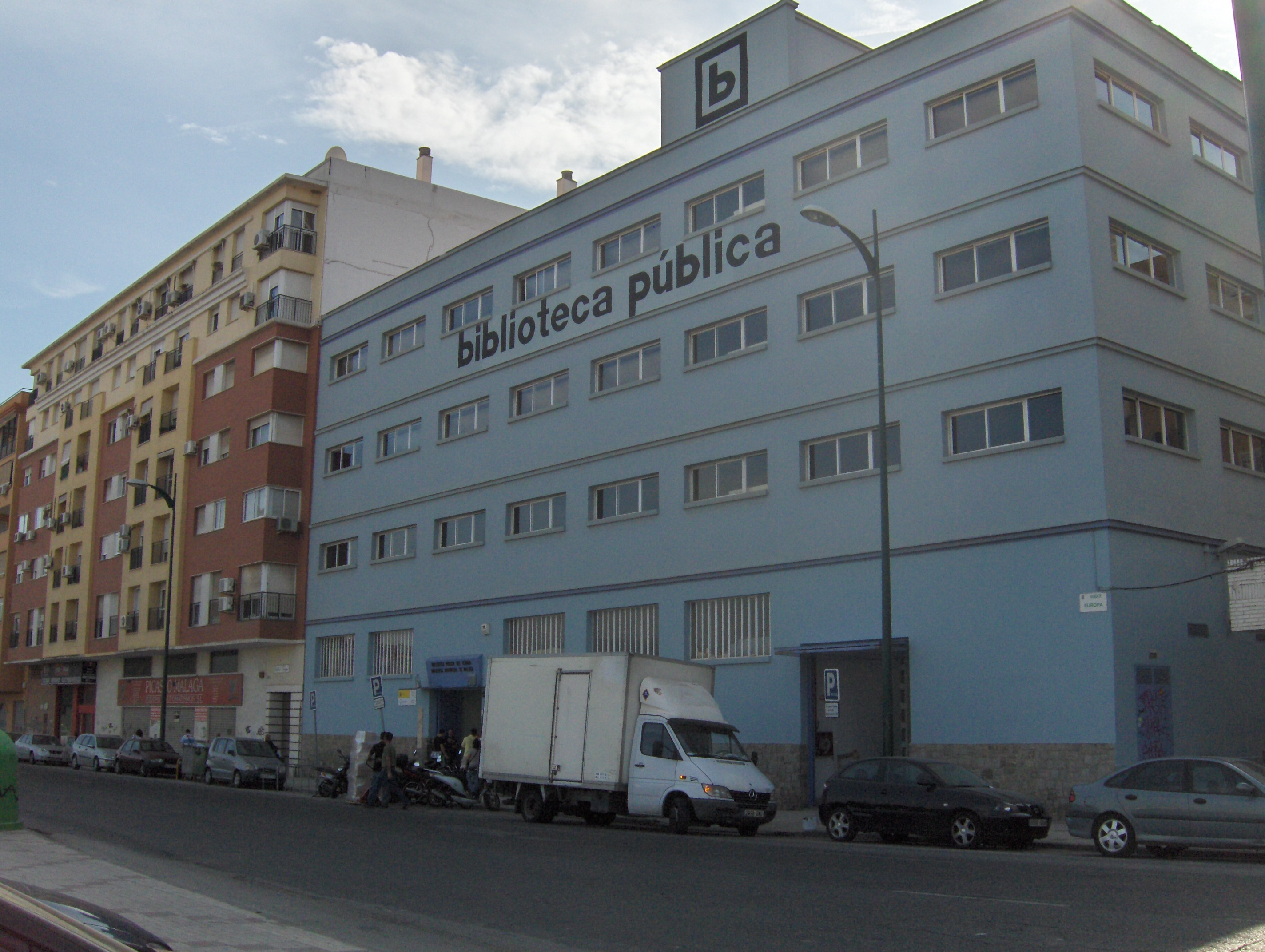 Biblioteca Provincial de Málaga, sección de arqueología.